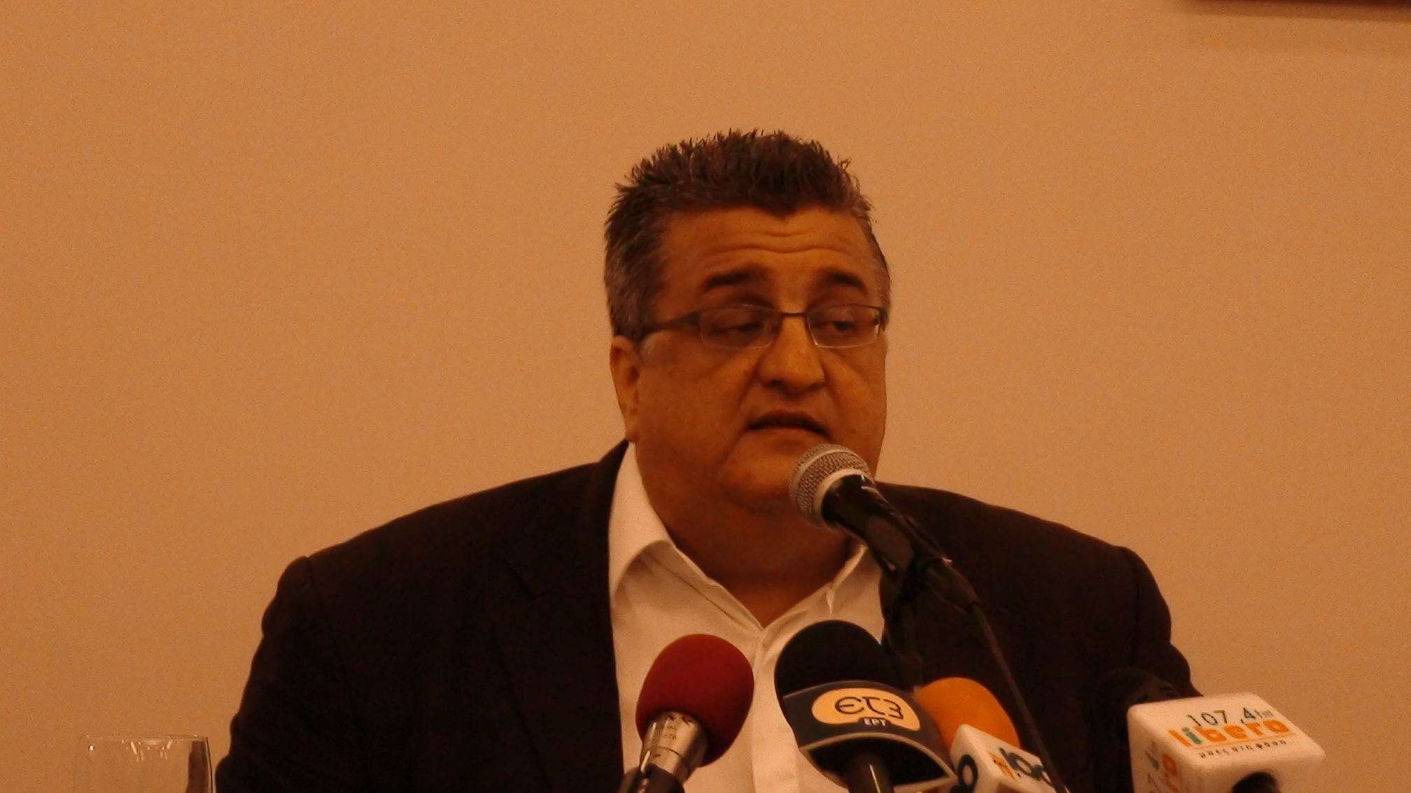 Λάμπρος Σκόρδας